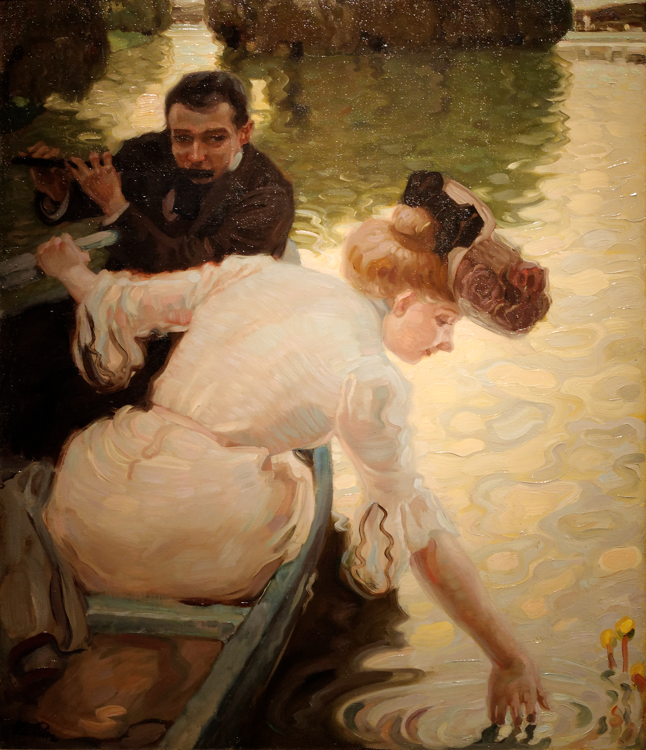 Idylle, Leo Putz (1901). Acquis en 1902 par la galerie nationale hongroise, Budapest. Inv n°45.B